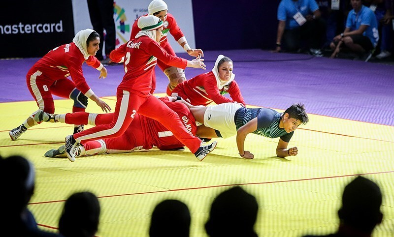 تیم کبدی زنان ایران در بازی‌های آسیایی ۲۰۱۸